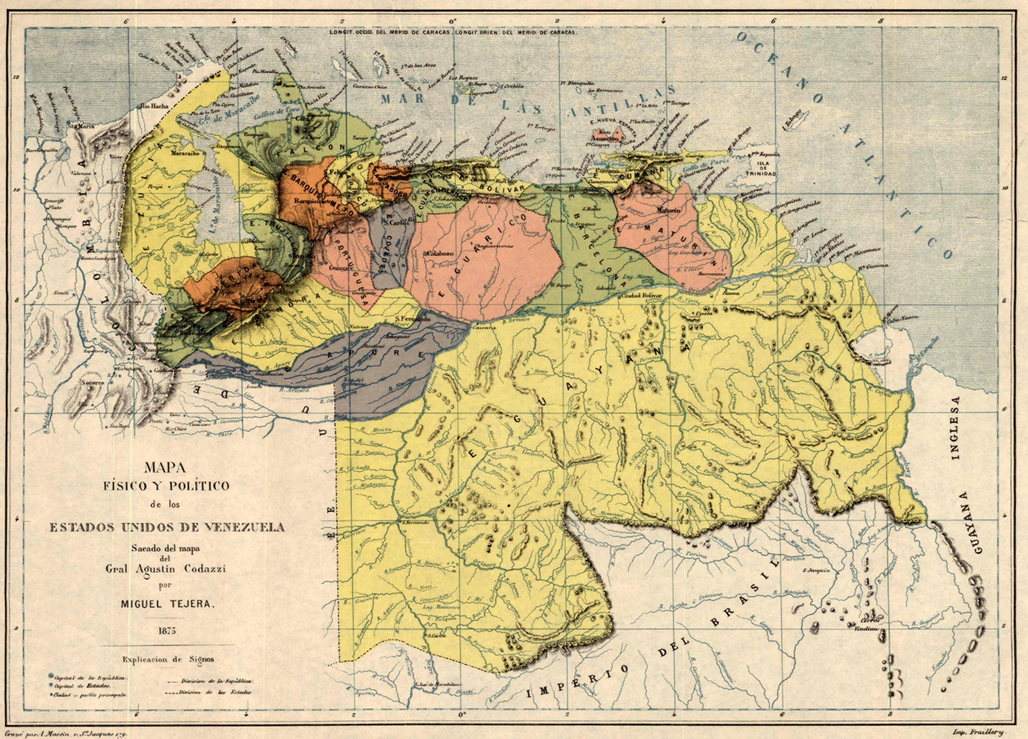 Mapa físico y político de los Estados Unidos de Venezuela